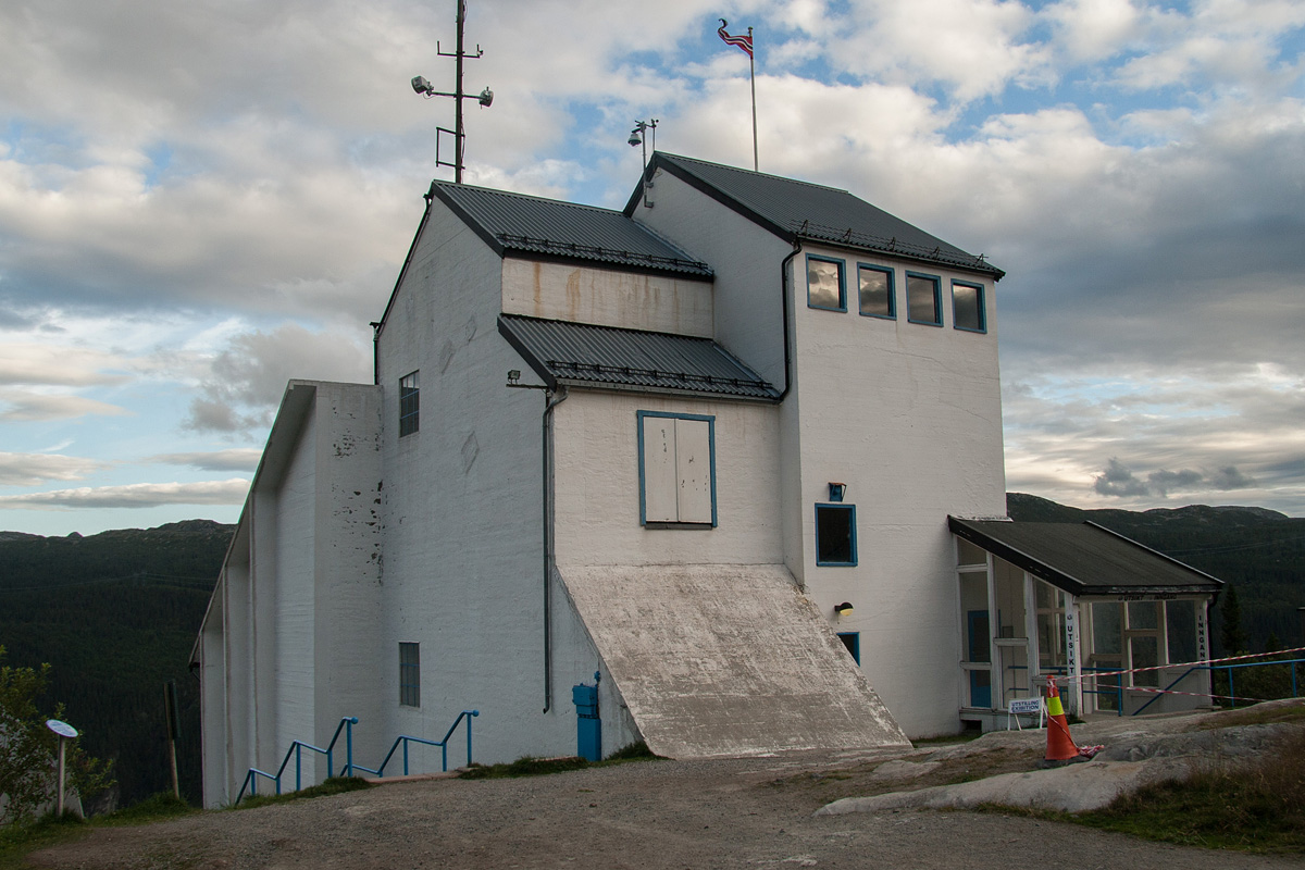 Krossobanens øvre stasjon på Gvepseborg.